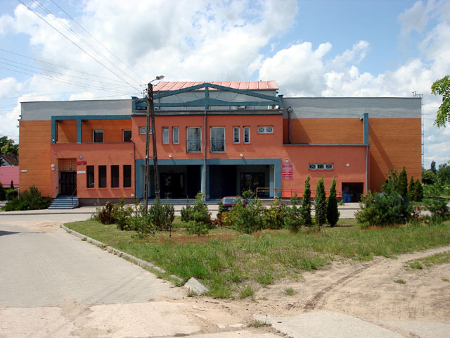 Gorzyca - Kulturhaus der Gemeinde